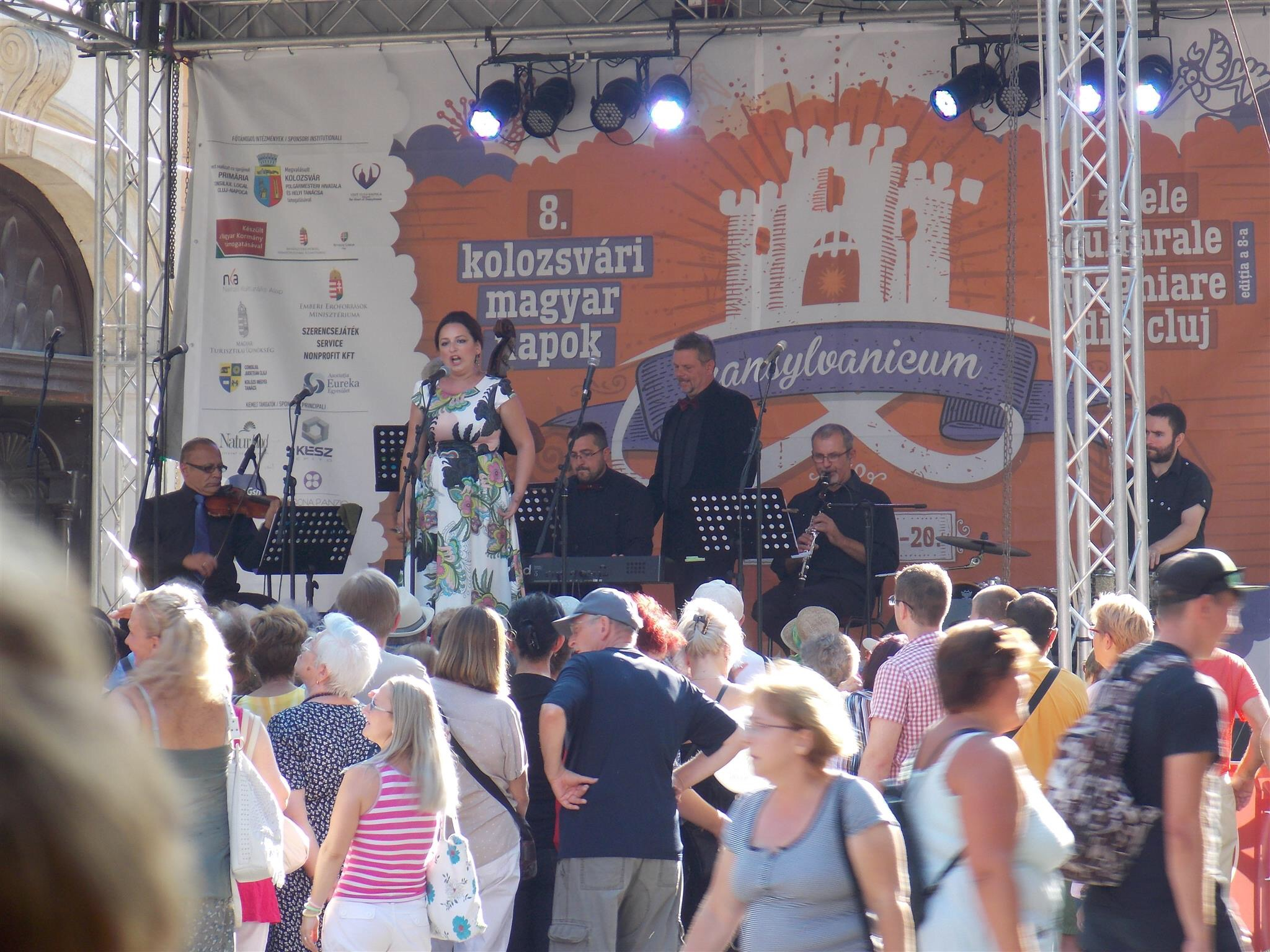 Kolozsvári Magyar Napok, Farkas Utcai színpad, 2017 augusztus.